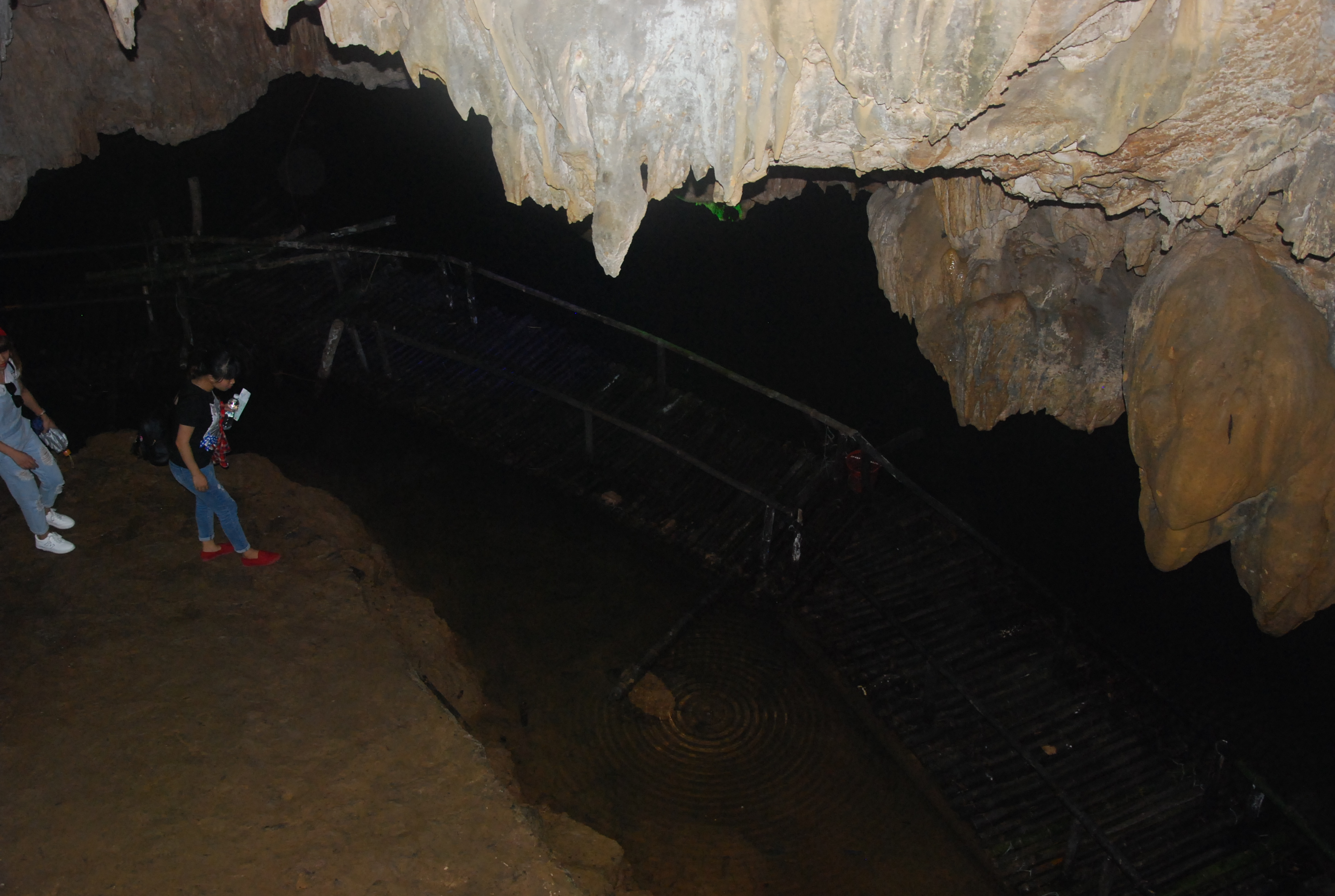 Động Tiên Cá thuộc Thung Nham trong Quần thể di sản thế giới Tràng An